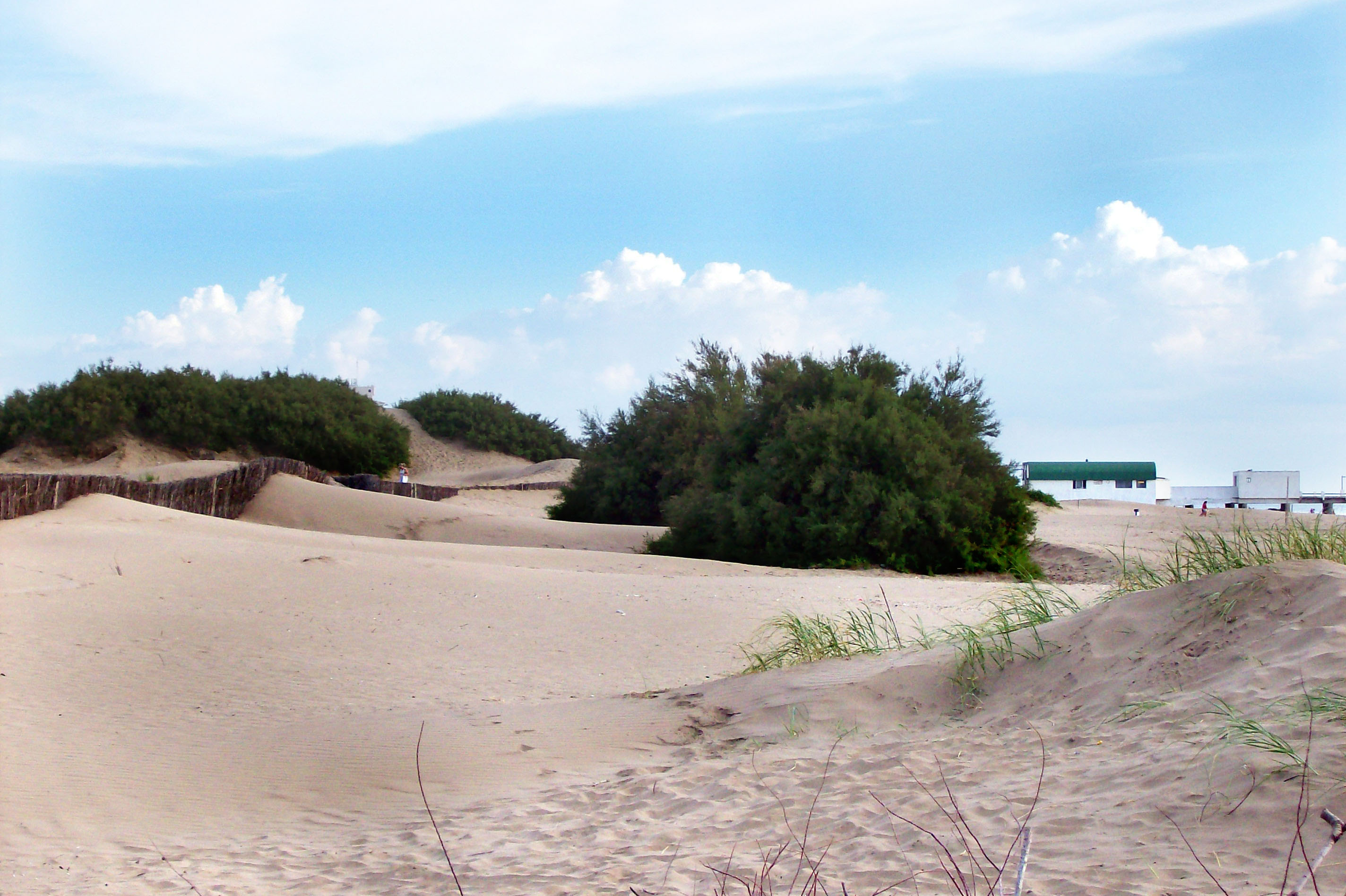 Dunes in Mar de Ajó, Buenos Aires province, Argentina